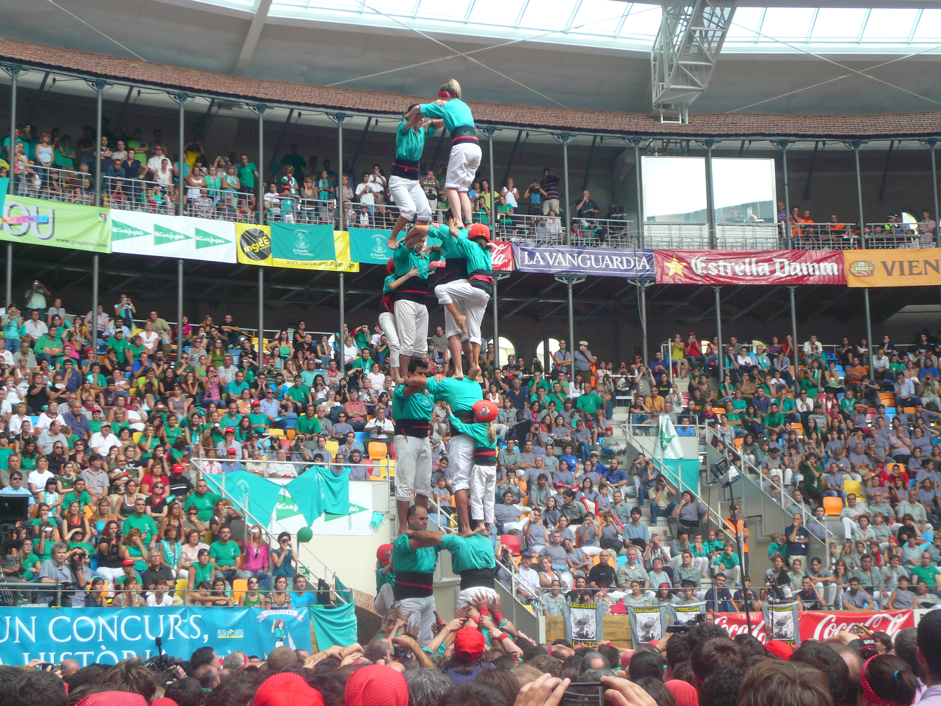 Concurs de Castells 2010, a la plaça de Toros de Tarragona, rebatejada com a Tarraco Arena. Object location41° 06′ 51.64″ N, 1° 14′ 43.03″ E